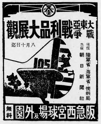 朝日新聞社大阪本社広告部発行『第二回翼賛広告研究会作品集』に掲載された大東亜戦争戦利品大展観の告知広告。